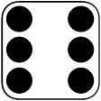 European die face 6